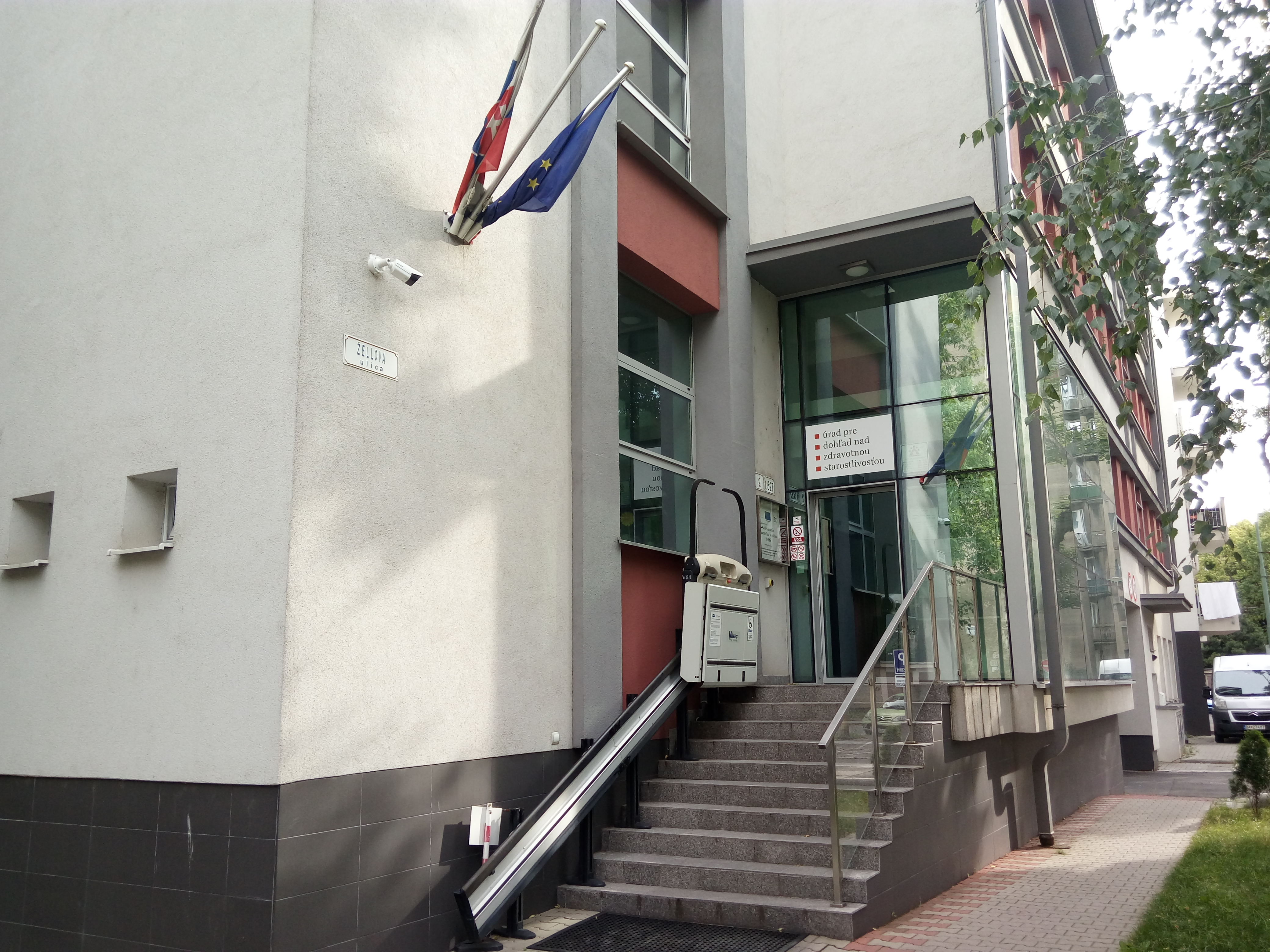 Žellova, Ružinov, Bratislava